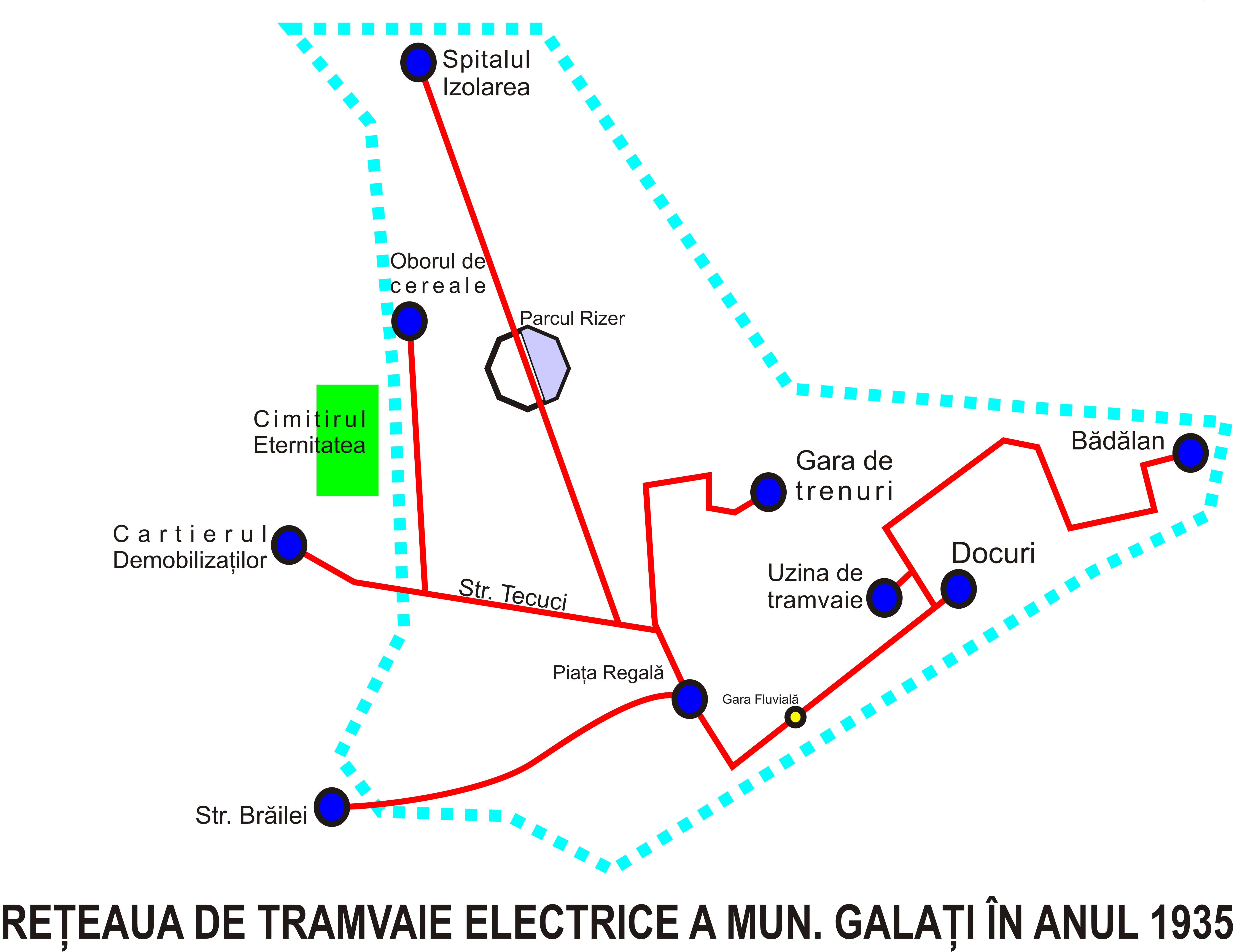 Reteaua de tramvaie din Galati in 1935